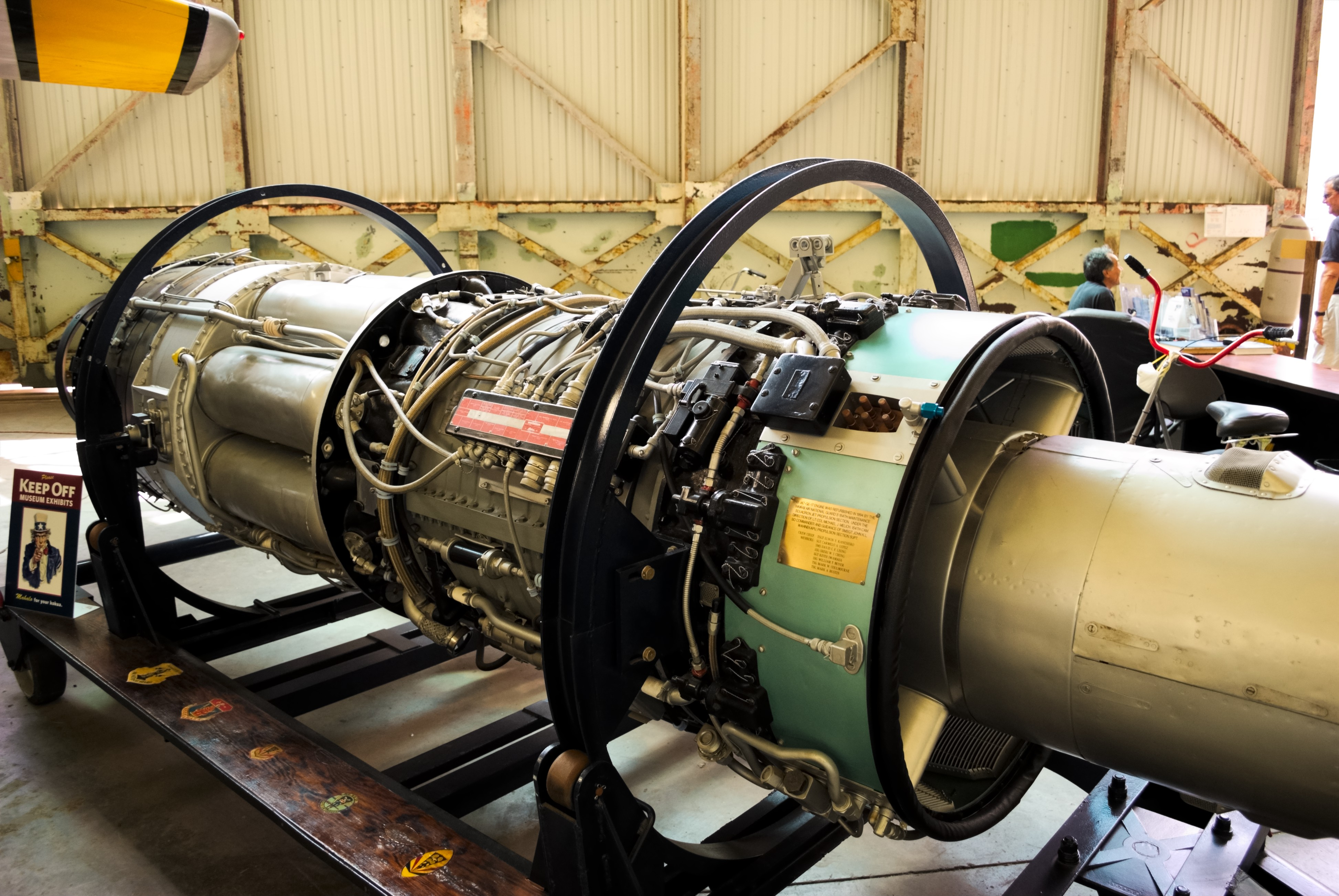 J47-GE-17 Engine